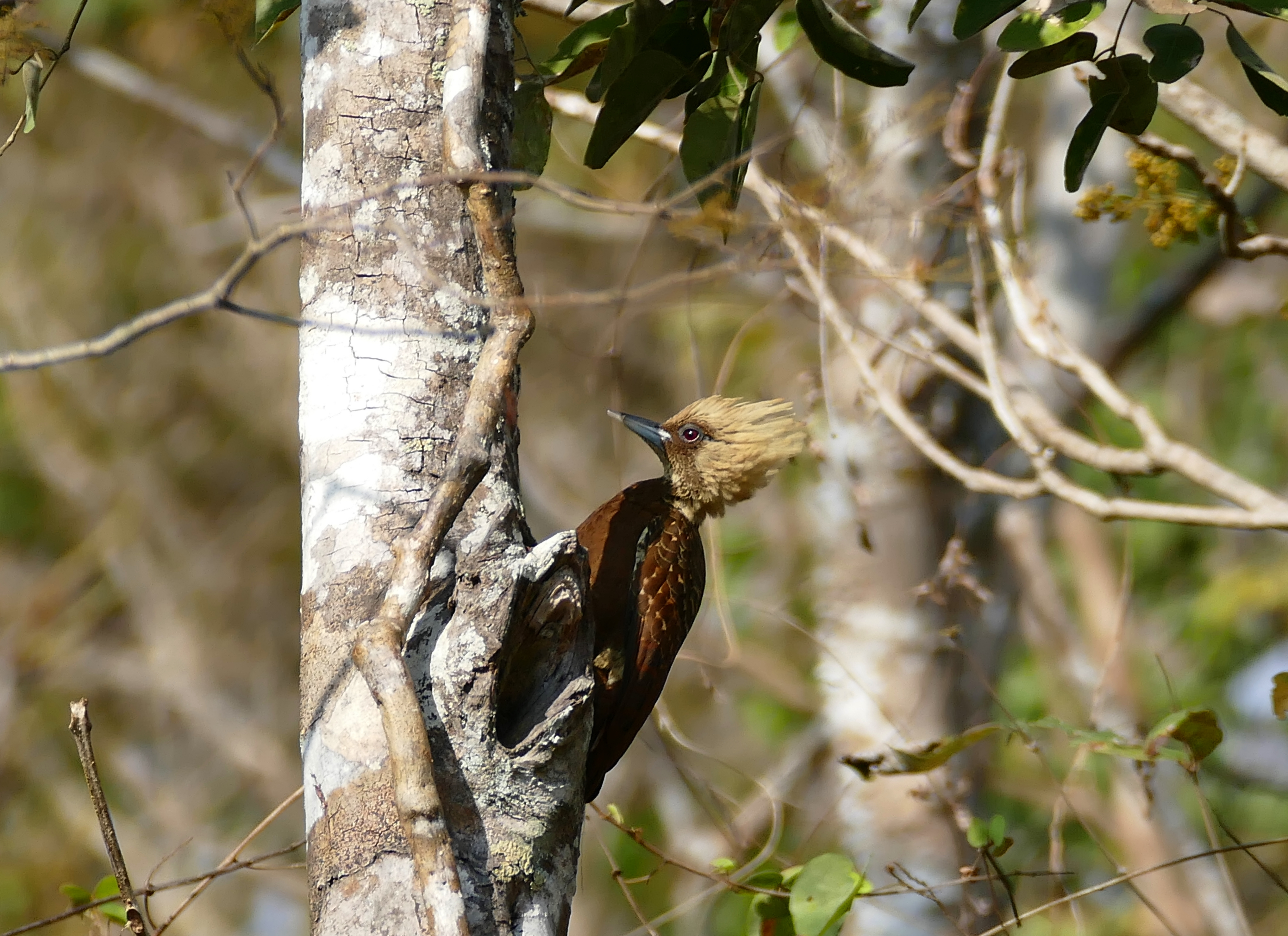 Pousada Rio Claro, Transpantaneira, Poconé, Mato Grosso, BRAZIL